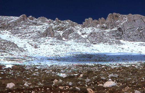 Chaine du Djurdjura en Kabylie (Algérie).